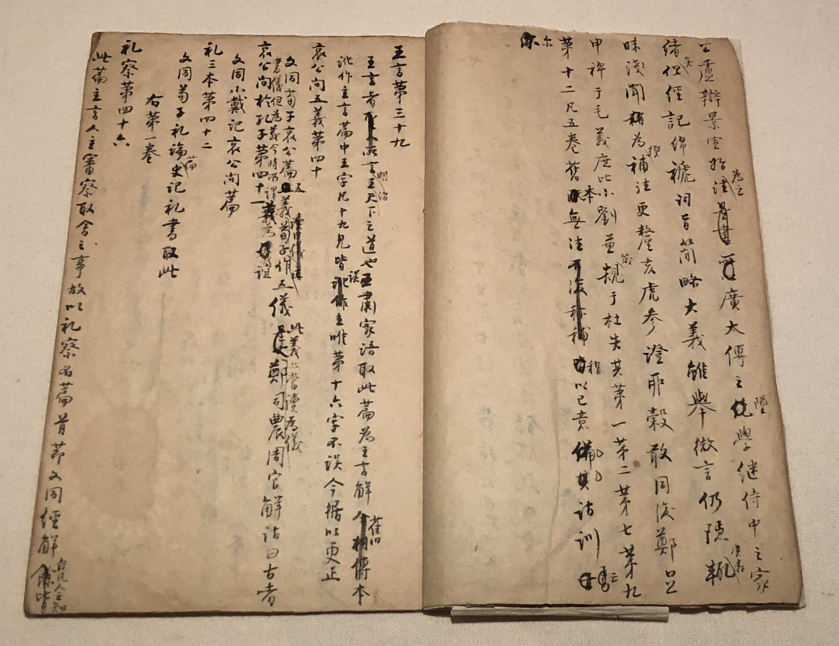 大戴礼记补助十三卷序录一卷 清 孔广森 撰 稿本